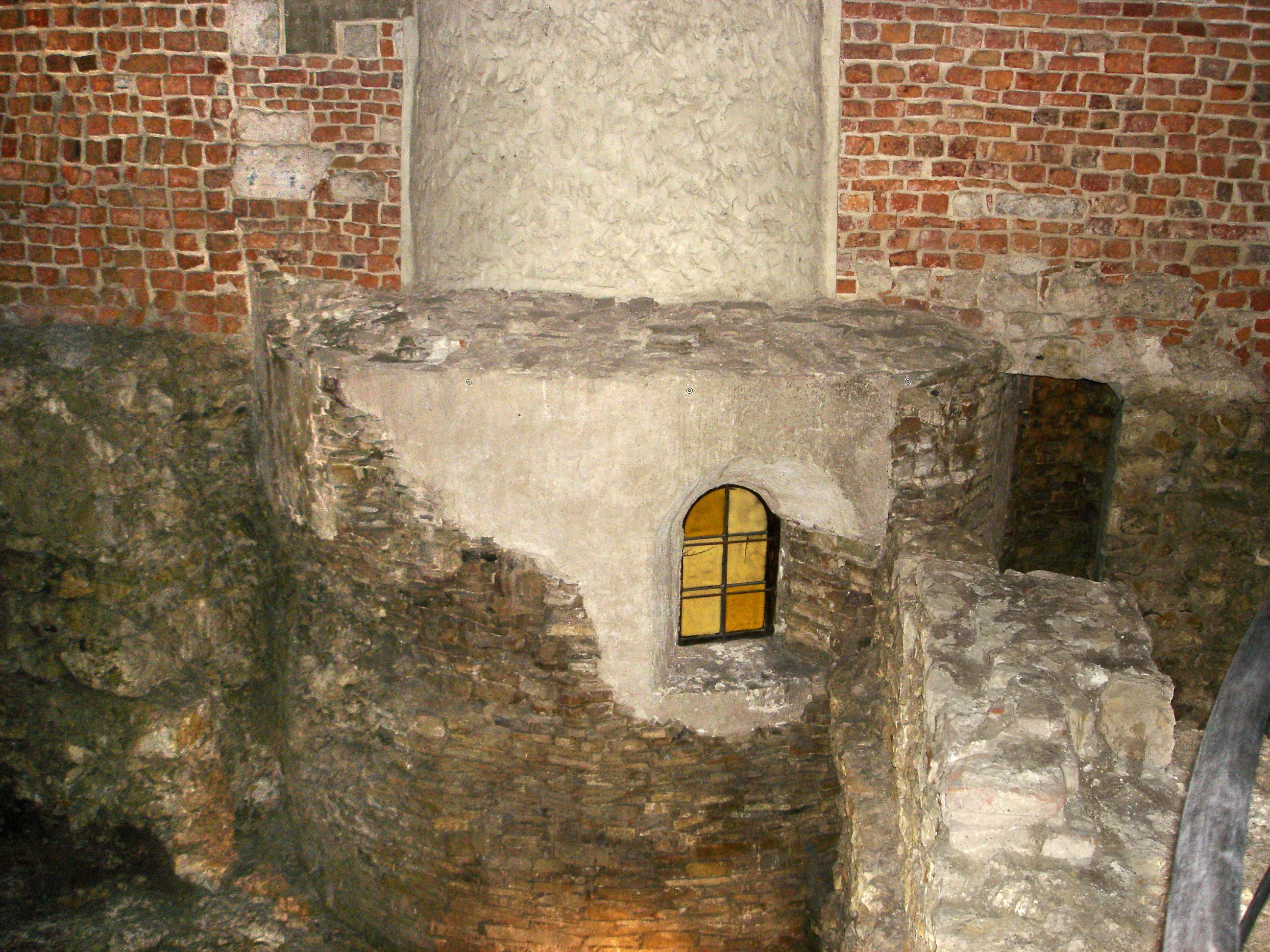 Grundmauern der Wawel während der Besuchertour "Versunkener Wawel"